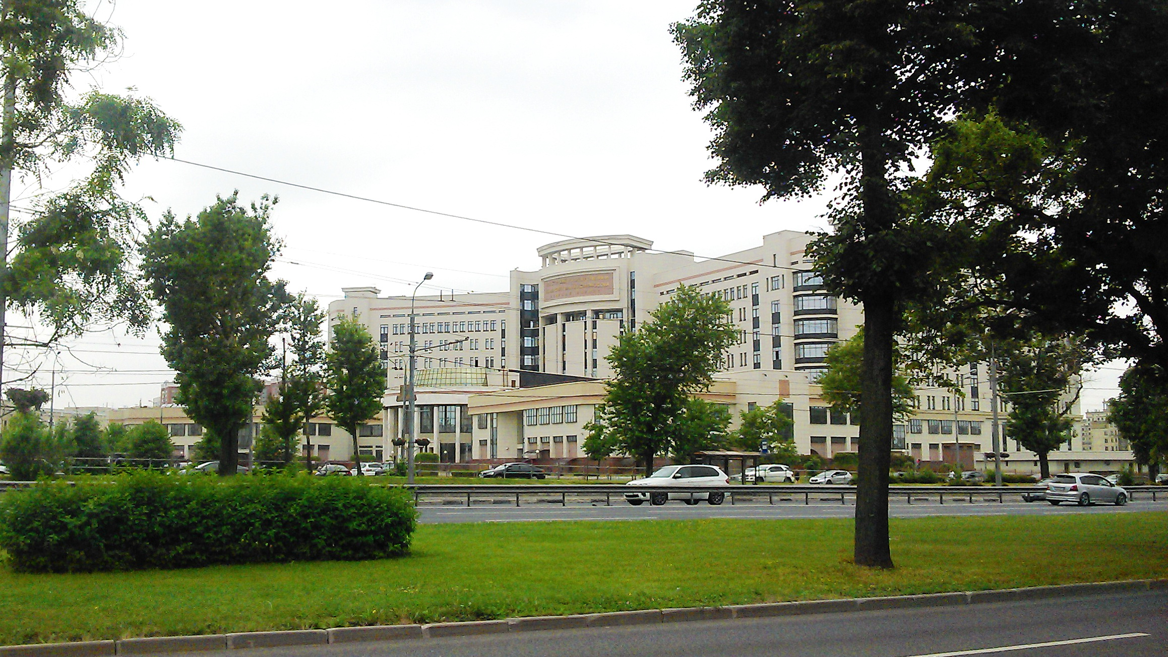 Шуваловский корпус МГУ